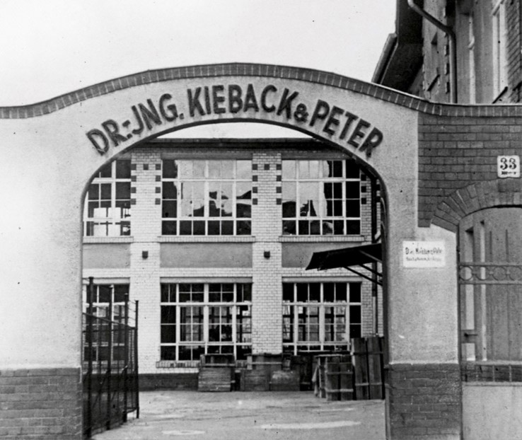 ворота kp